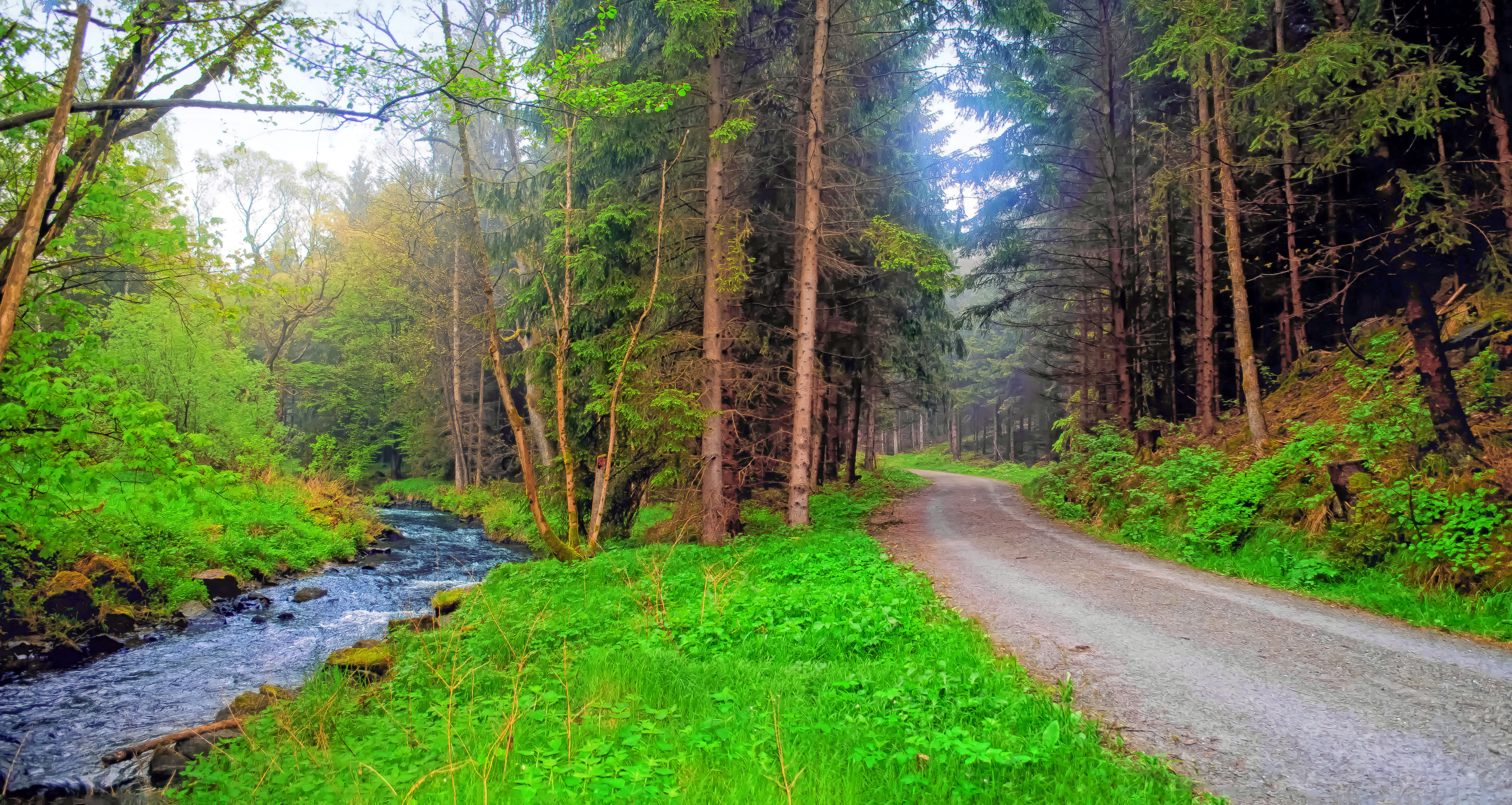 Naturschutzgebiet Heilige Hallen in Sachsen